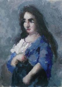 Balgley jacob jacques-portrait de femme